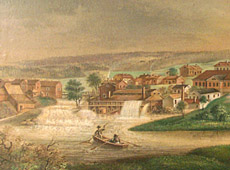 Hargs fabriksområde 1845